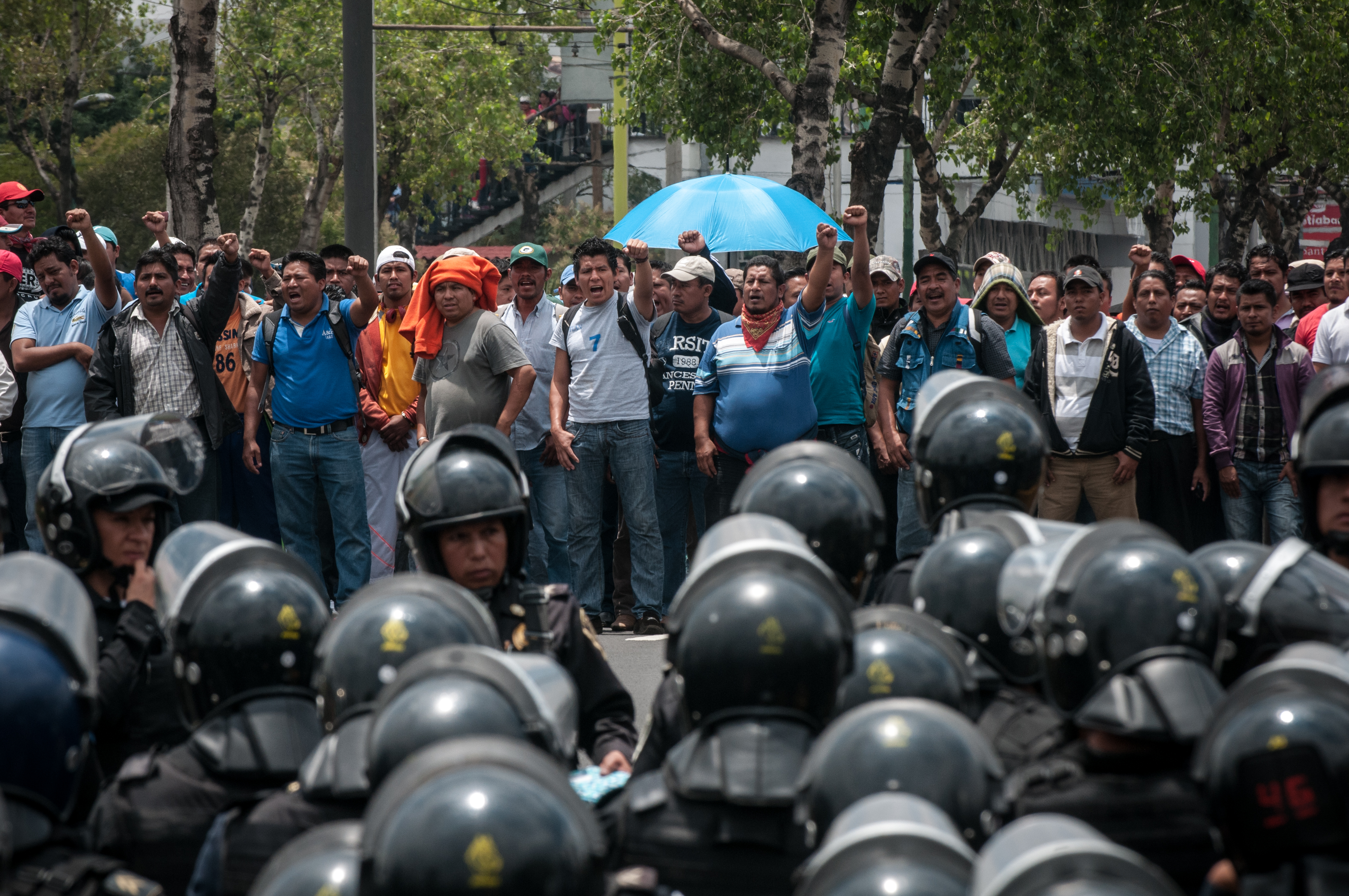 Profesores de la Coordinadora Nacional de los Trabajadores de la Educación (CNTE) toman Boulevard Puerto Aéreo en la Ciudad de México en 2013.